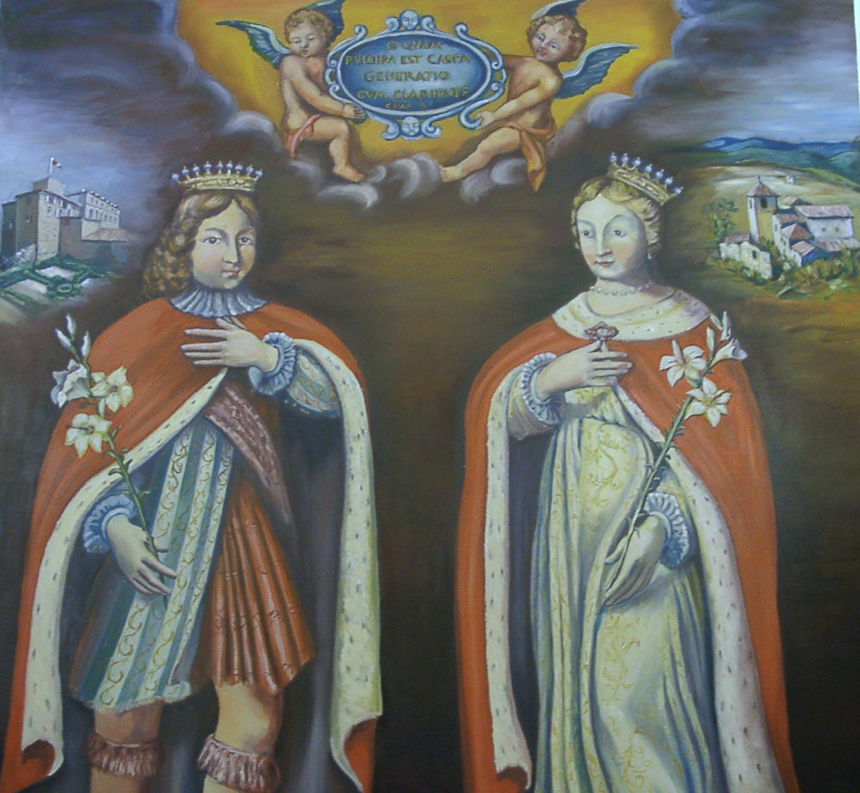 Les époux dans le chœur de l'église de Puimichel